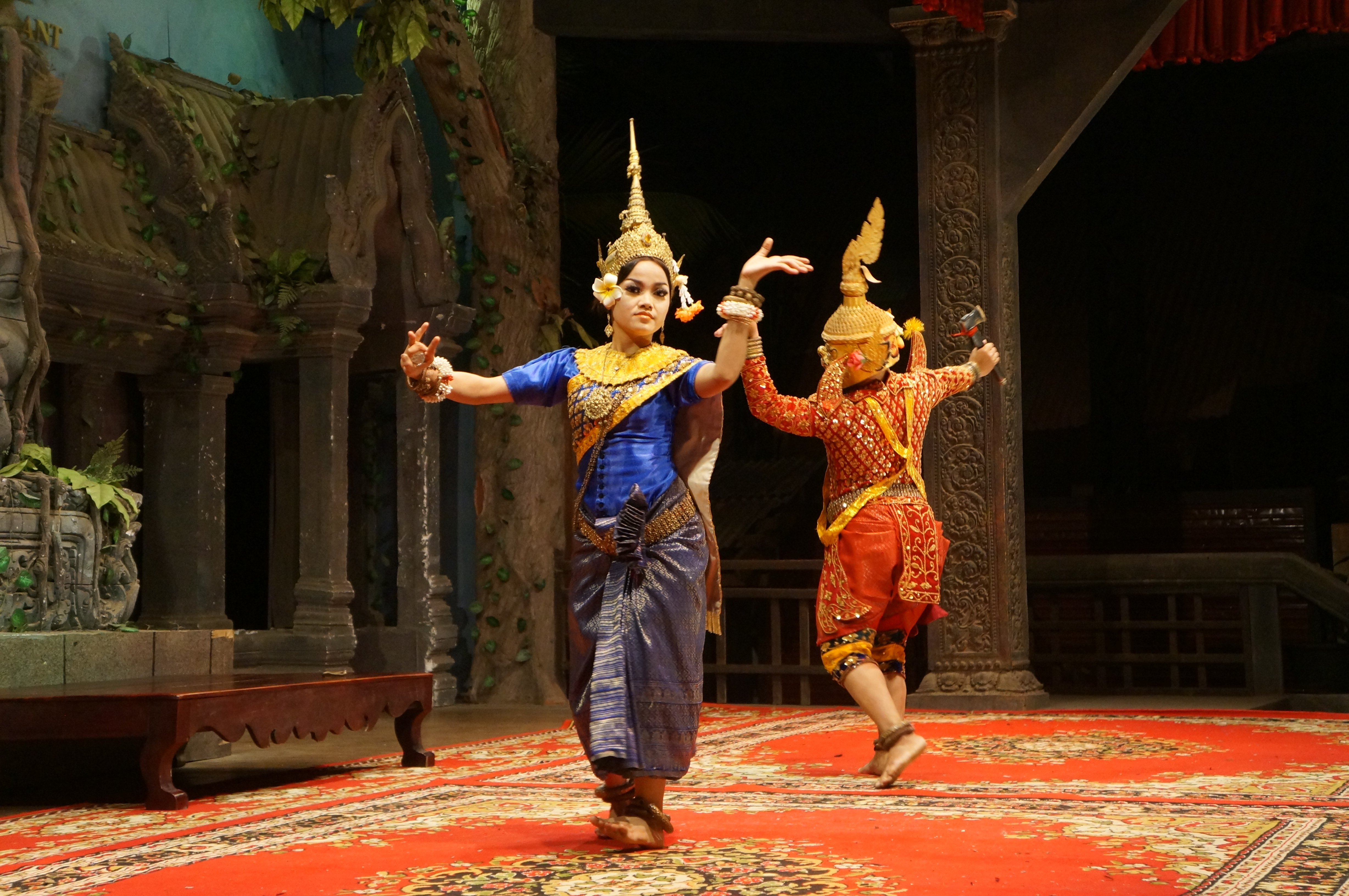 Cambodge, Danse classique cambodgienne à Siem Reap.